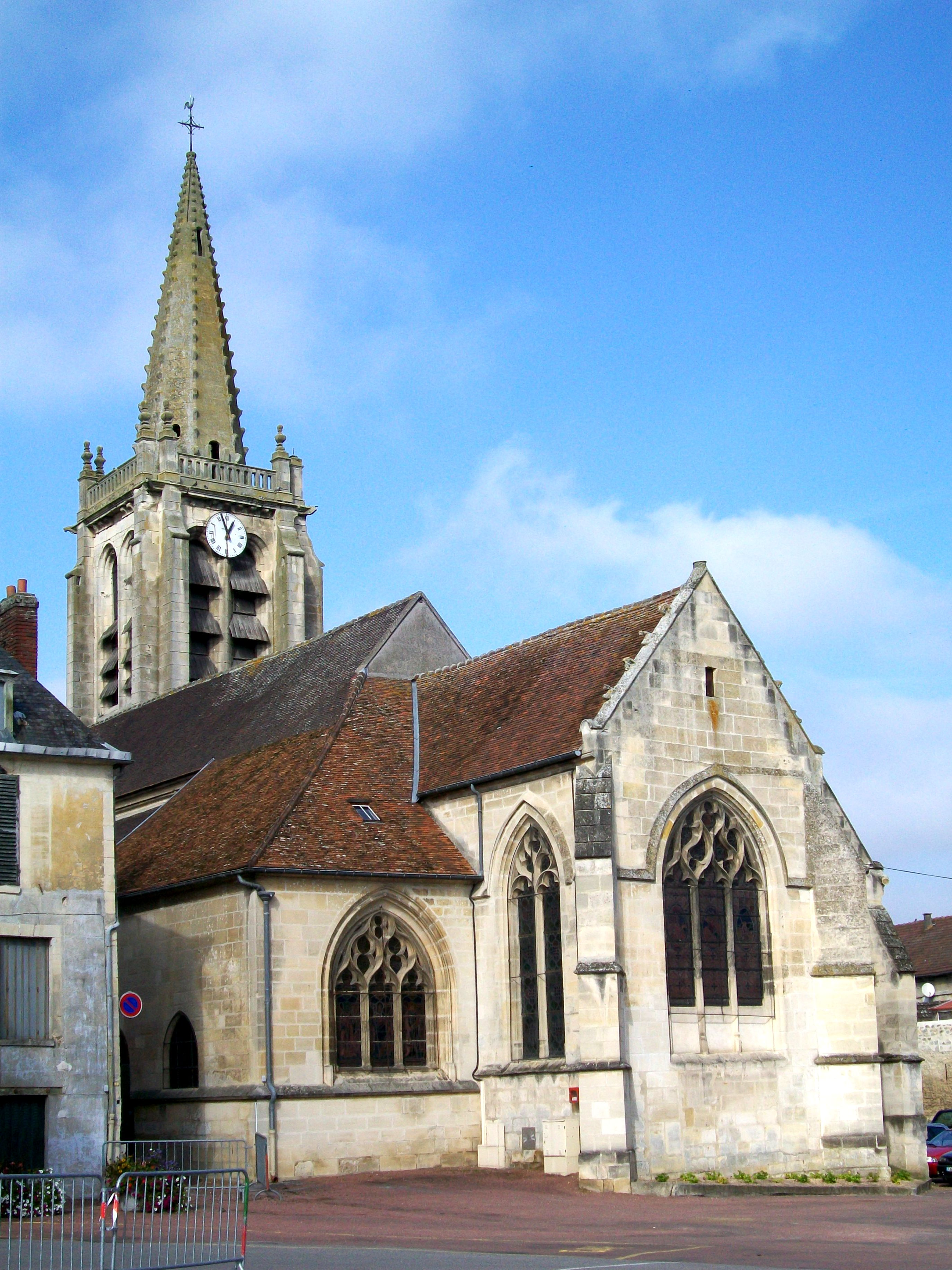 L'église Saint-Honoré, édifié autour de 1500 et inscrit au titre des Monuments historiques depuis 1927.